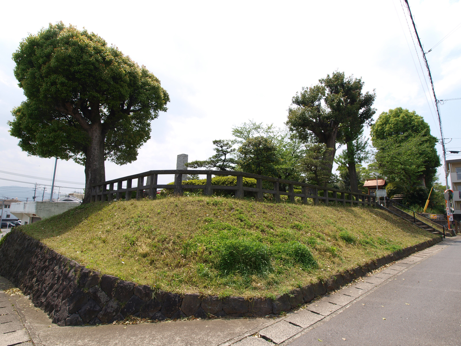 上原館（西山城）跡（大分県大分市）